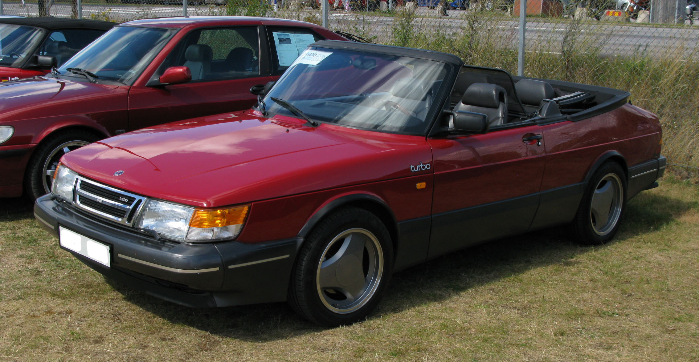 International Saab Meeting 2016.